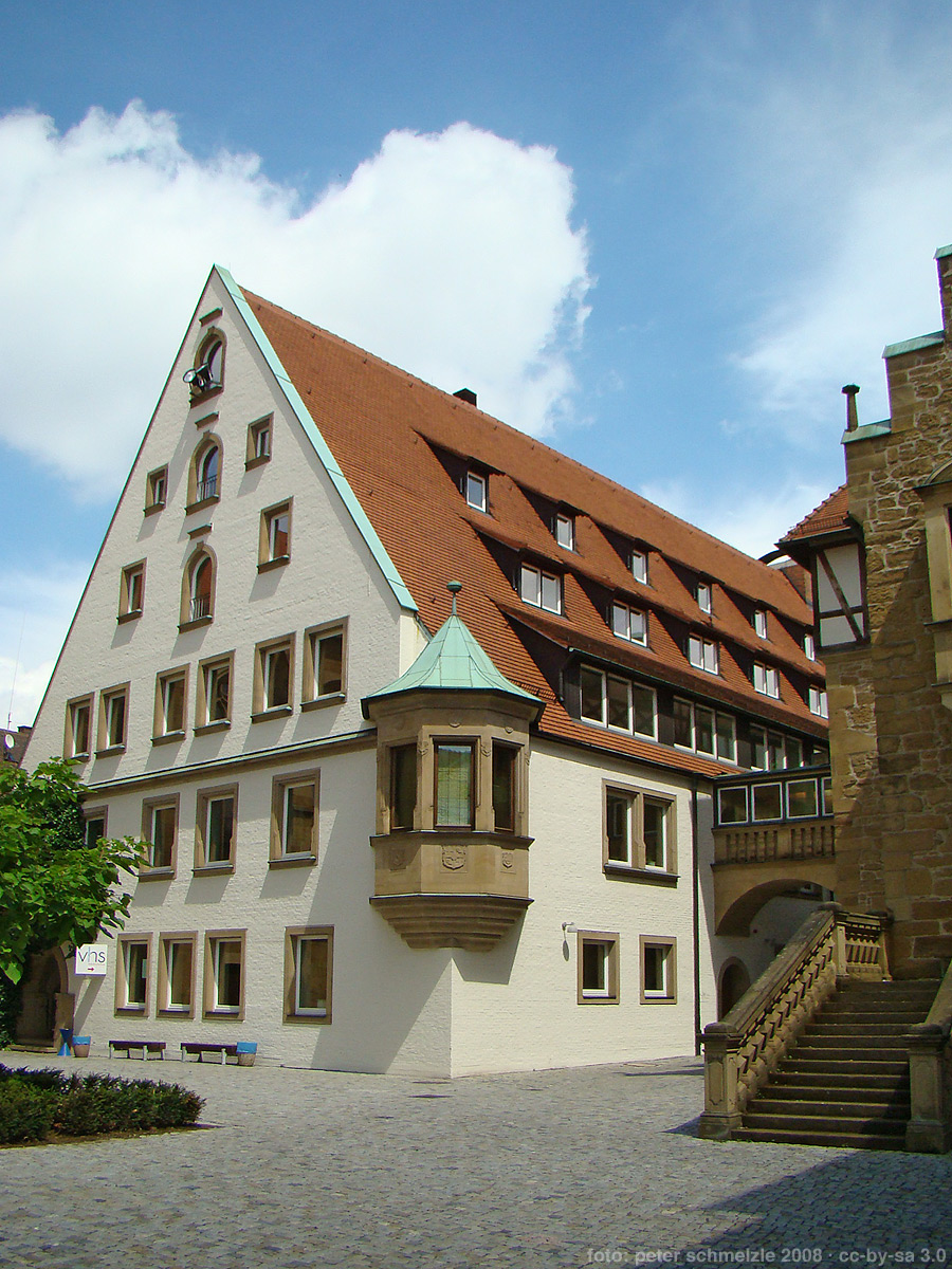 Deutschhof in Heilbronn, Ritterhaus